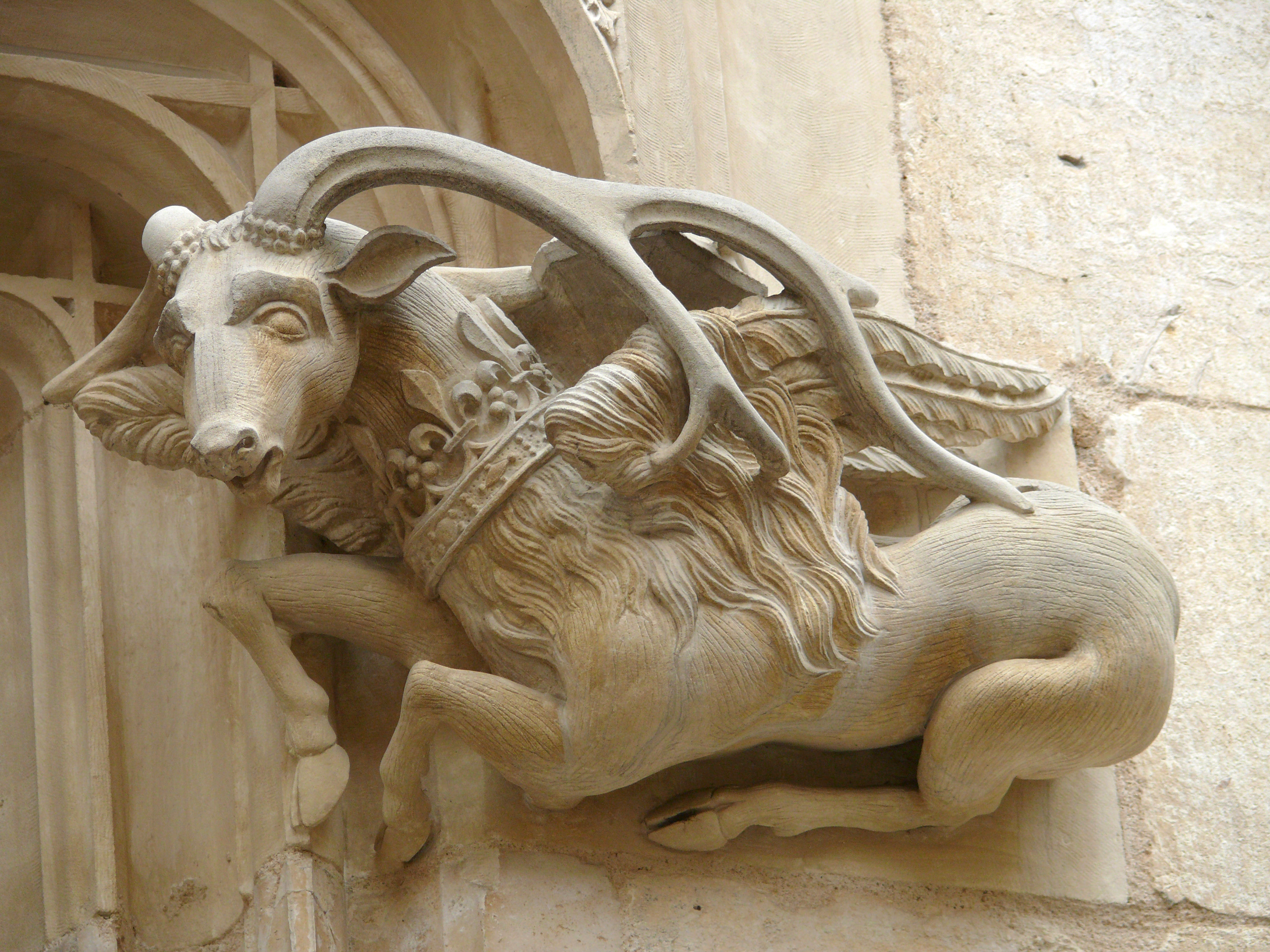 Bourges - Hôtel Lallemant - Décoration d'une fenêtre sur cour après restauration